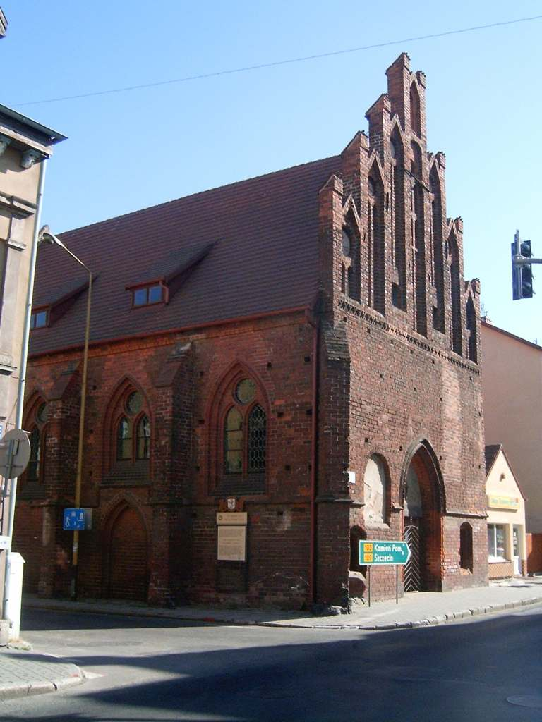 Kaplica Świętego Ducha w Trzebiatowie/Cerkiew prawosławna pw. Świętego Ducha w Trzebiatowie